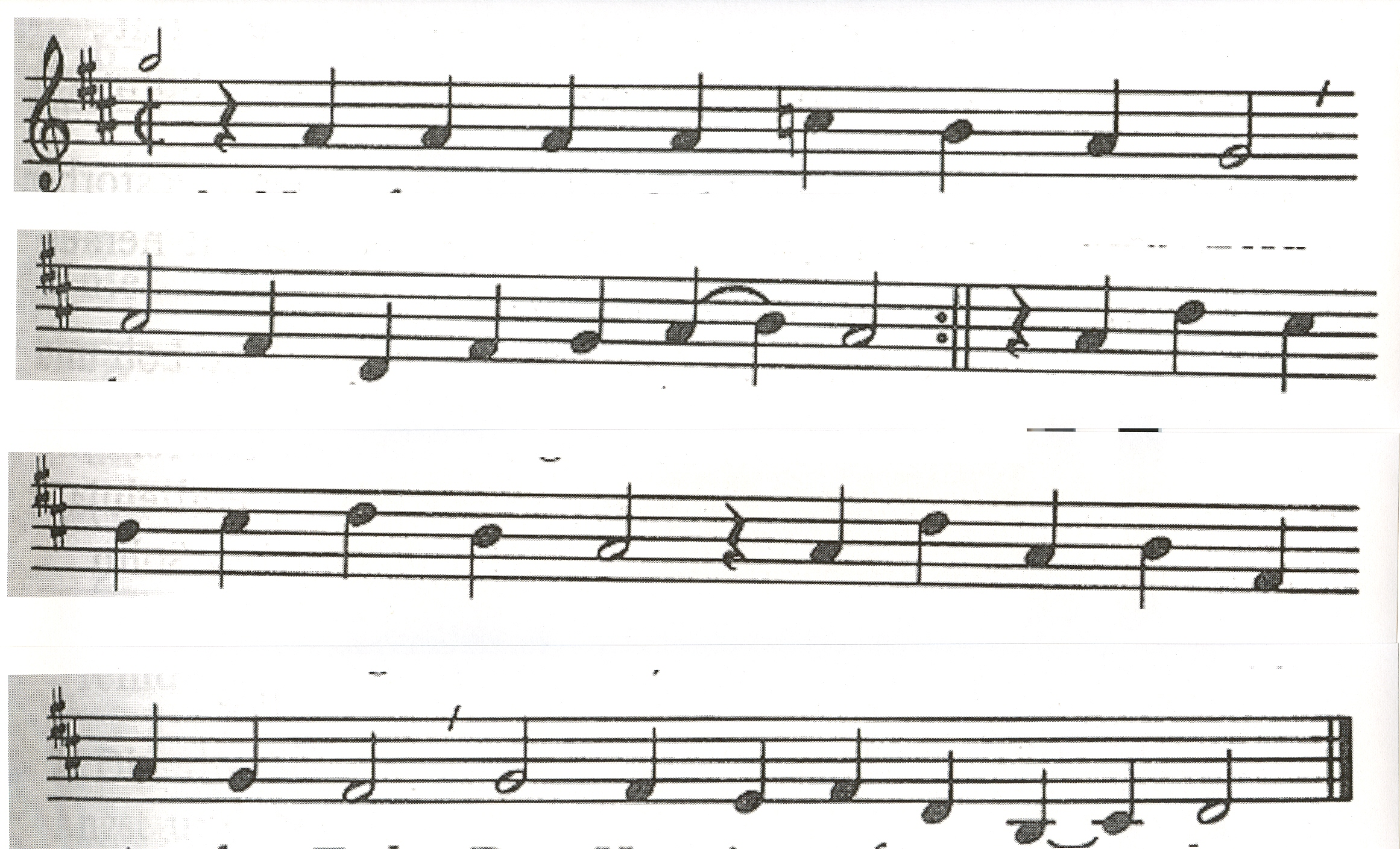 Melodie des Verena-Liedes der röm.-kath. Kirchengemeinde St. Verena Rot an der Rot Vom Morgenlande kamst du her, Verena, Frau aus Theben. Trugst Christi Liebe über's Meer, ein Zeugnis uns zu geben. Heut' die Gemeinde auf dich schaut, sich der Patronin anvertraut. Heilige Verena, bitt für uns....